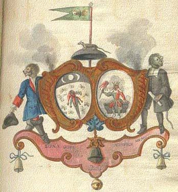 Armes du régiment de la Calotte, société festive et carnavalesque créée en 1702.